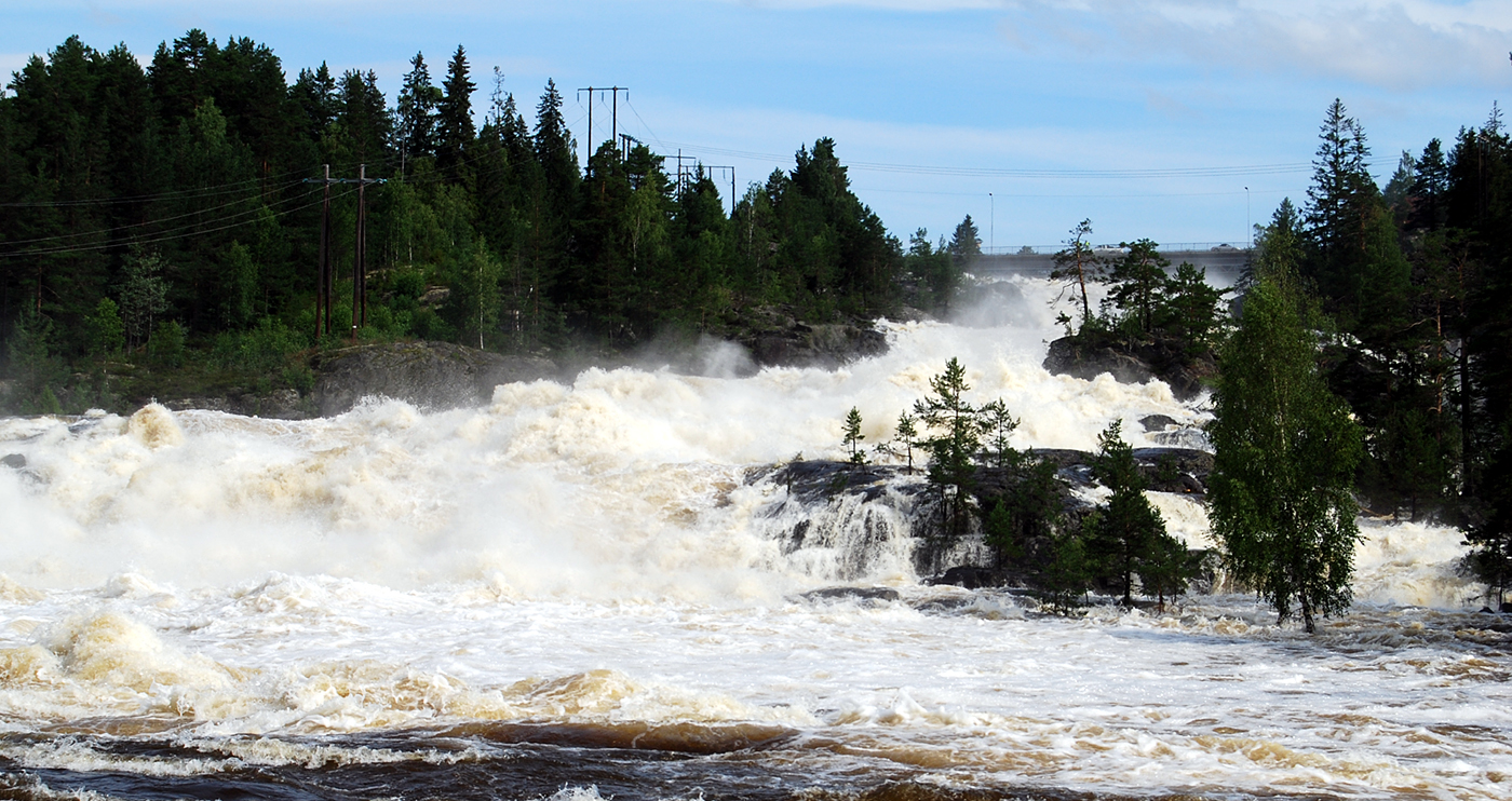 Labrofossen, Kongsberg, under flommen i juli 2007.